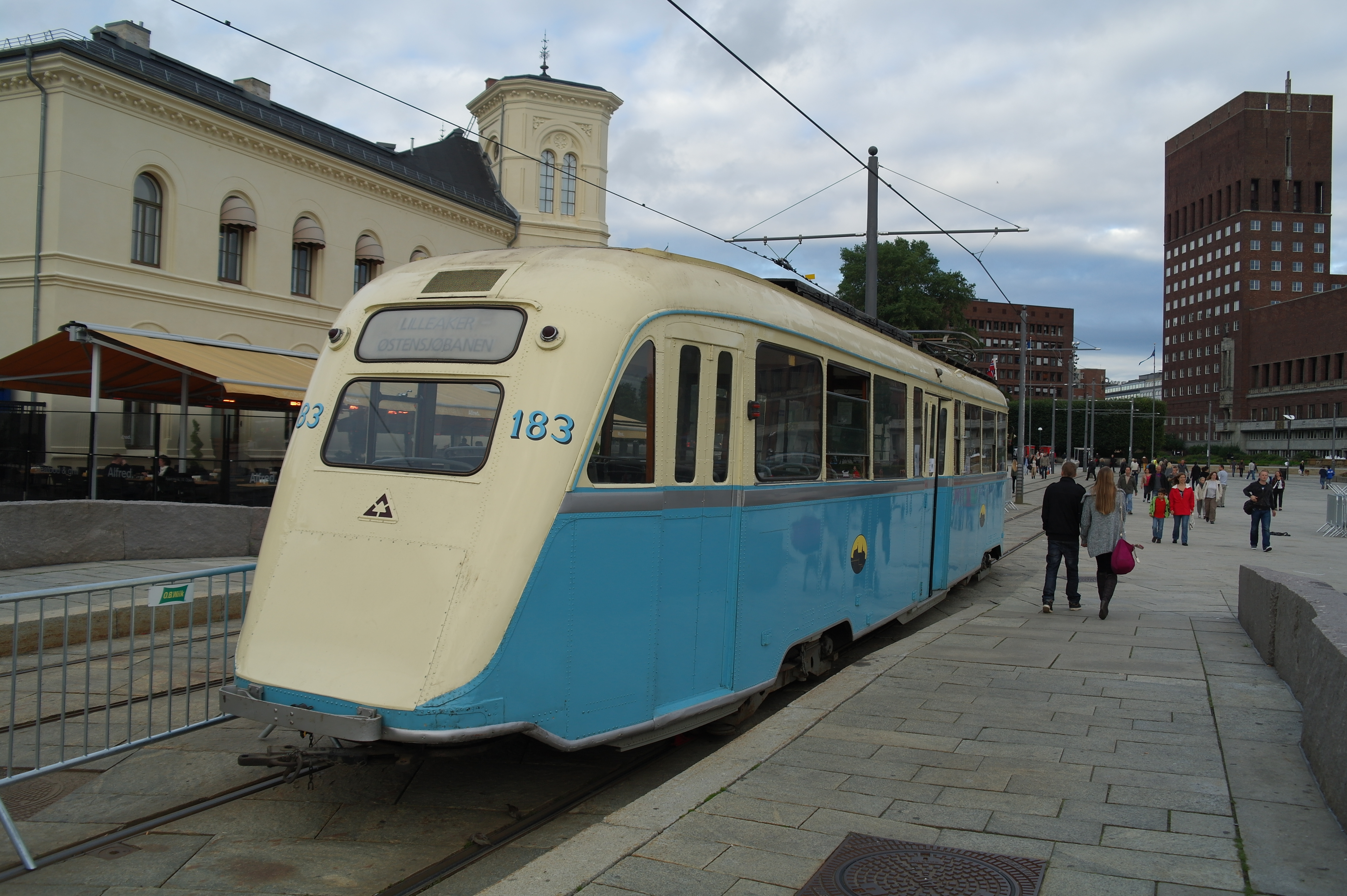 Halen på gullfisk trikk